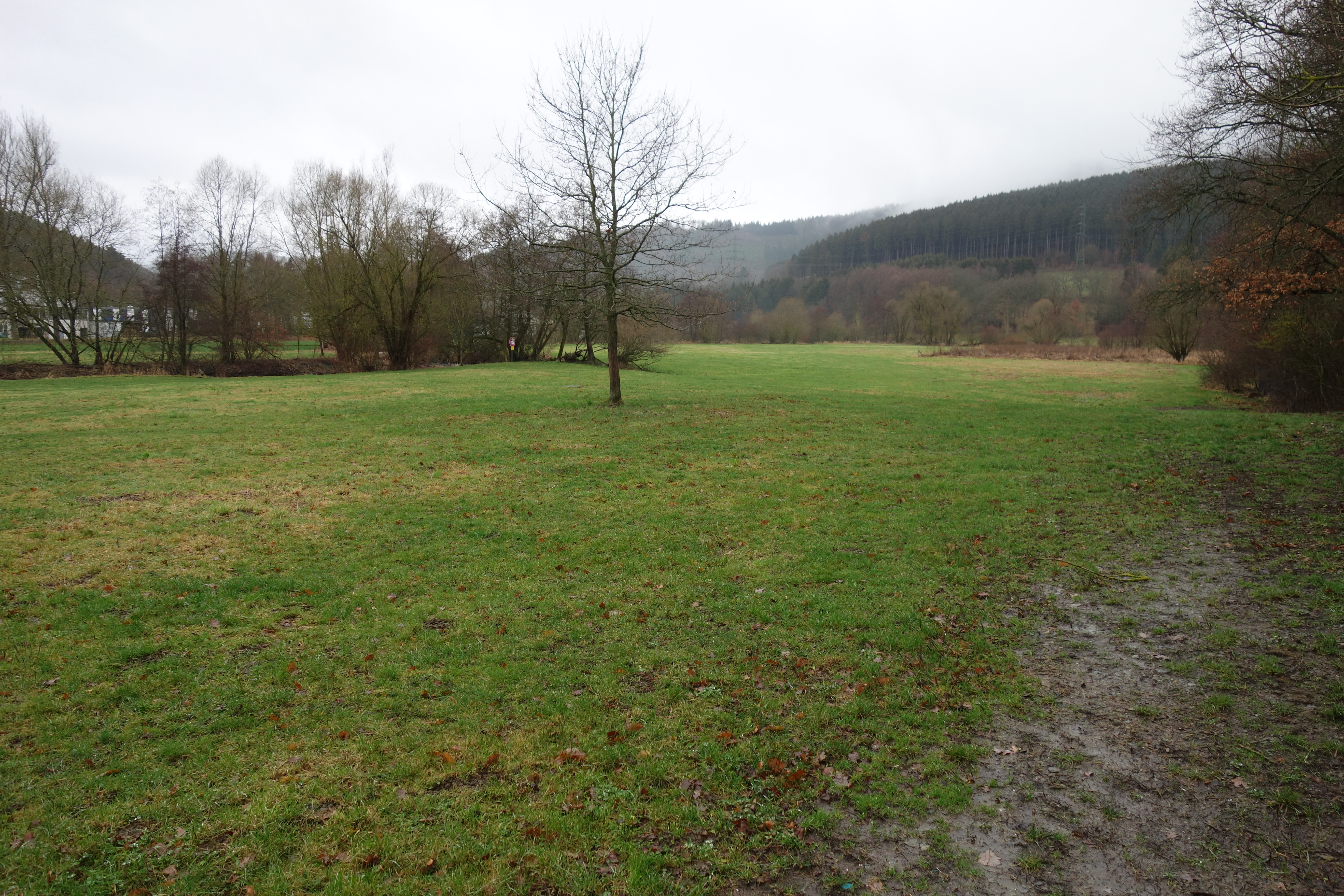 Naturschutzgebiet Lennetal unterhalb Schmallenberg vom Ostrand aus. Wald im Hintergrund gehört nicht zum NSG.